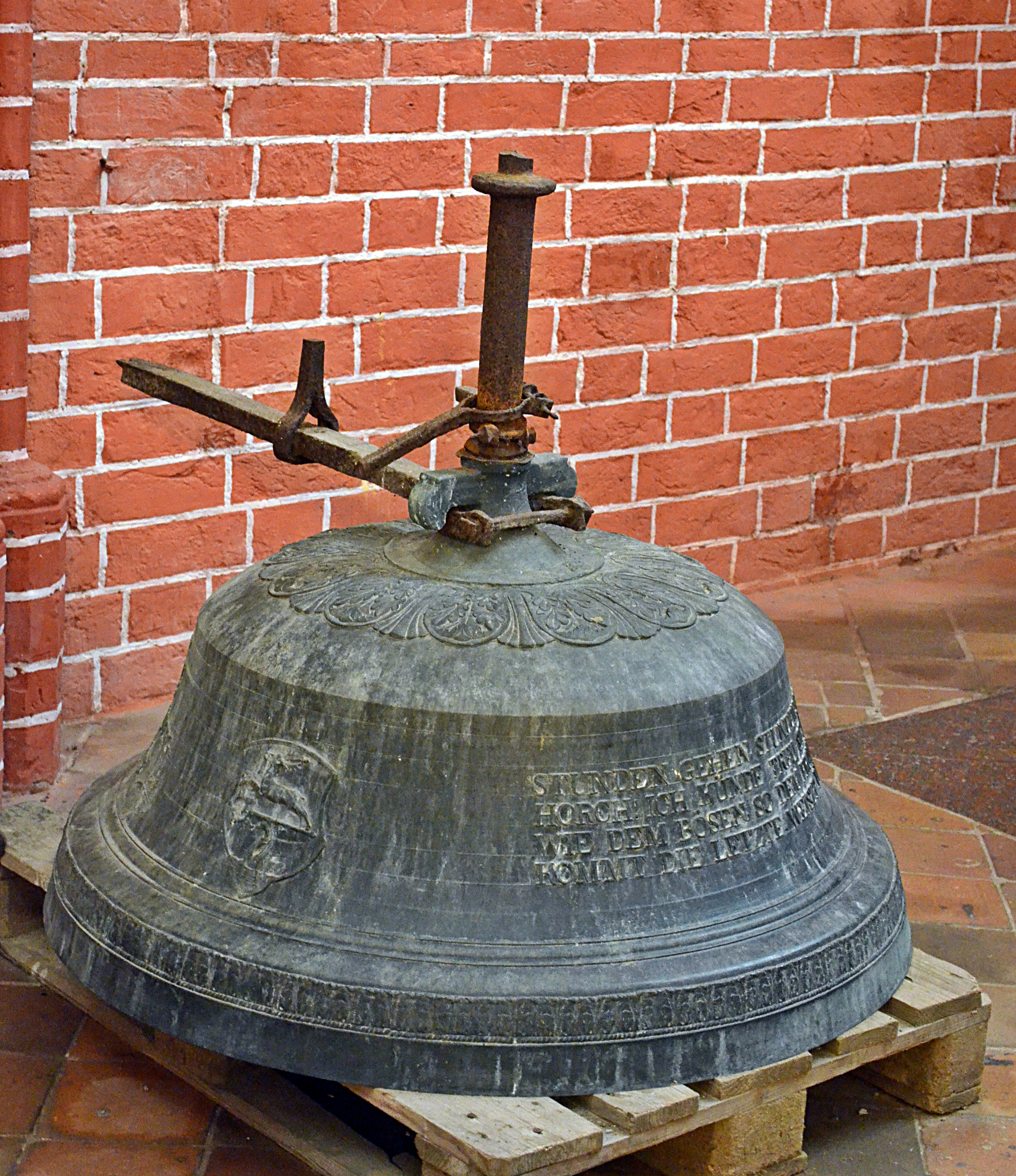 Bad Doberan, Münster, alte Stundenglocke